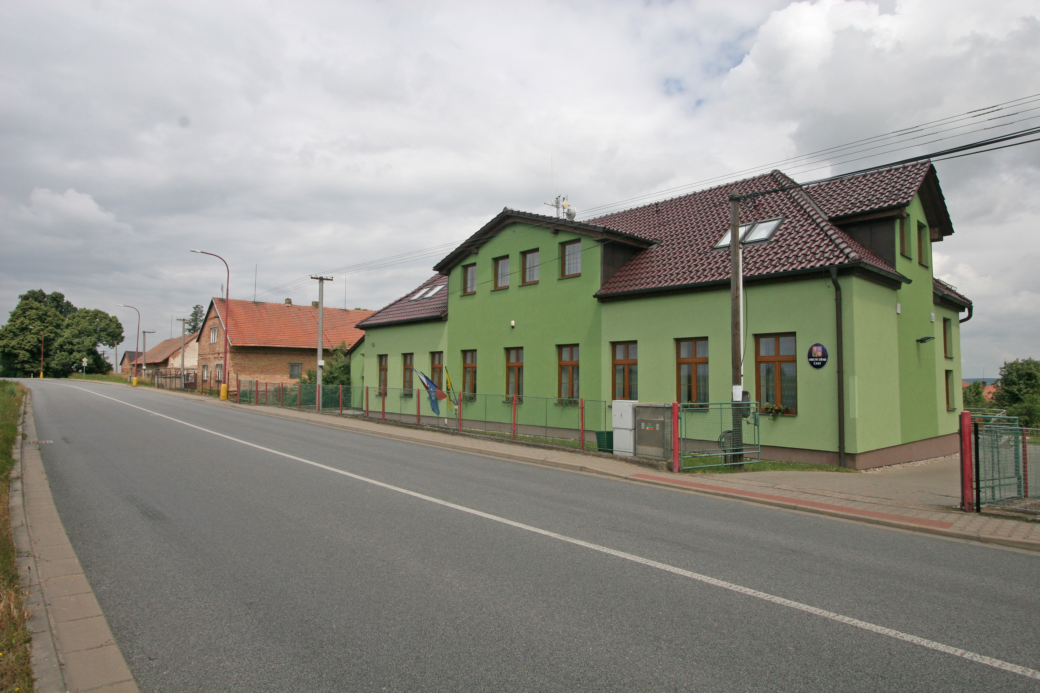 Časy obecní úřad